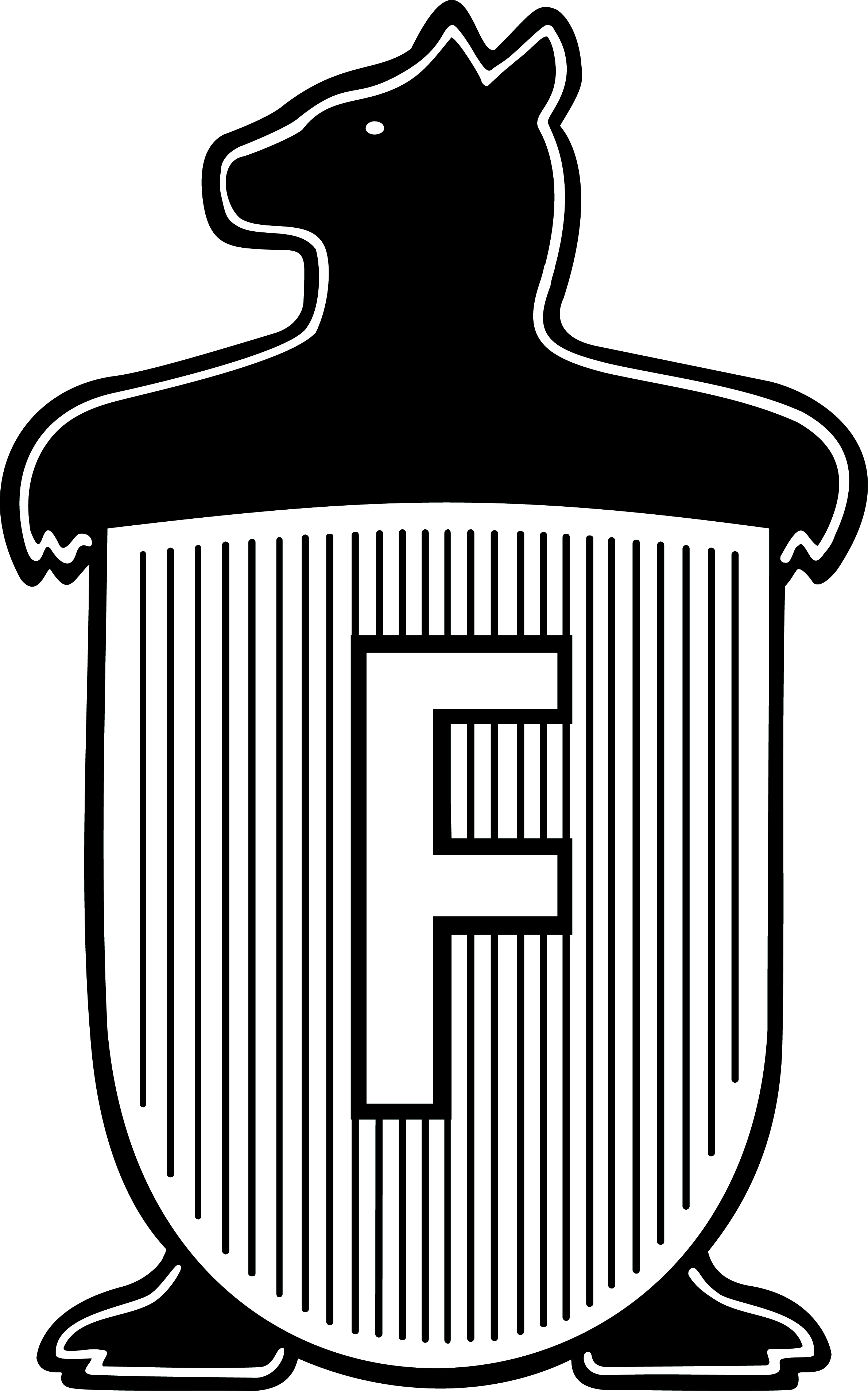 Logo des Freiheitsbundes Berlin e.V.